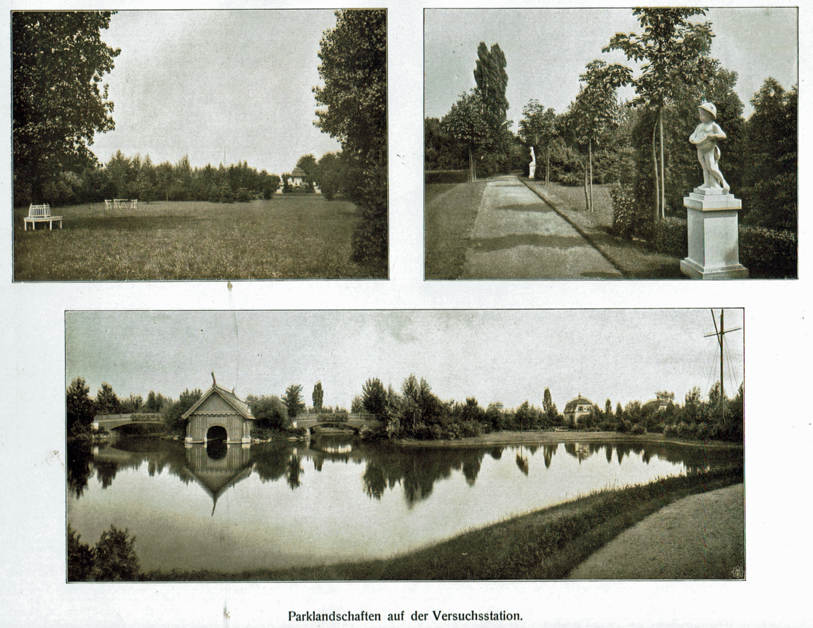 Rud. Sack. Leipzig-Plagwitz. 1863–1913. Lebensgeschichte des Begründers, Entwicklung und Stand des Werkes. Meisenbach Riffarth & Co., Leipzig 1913.